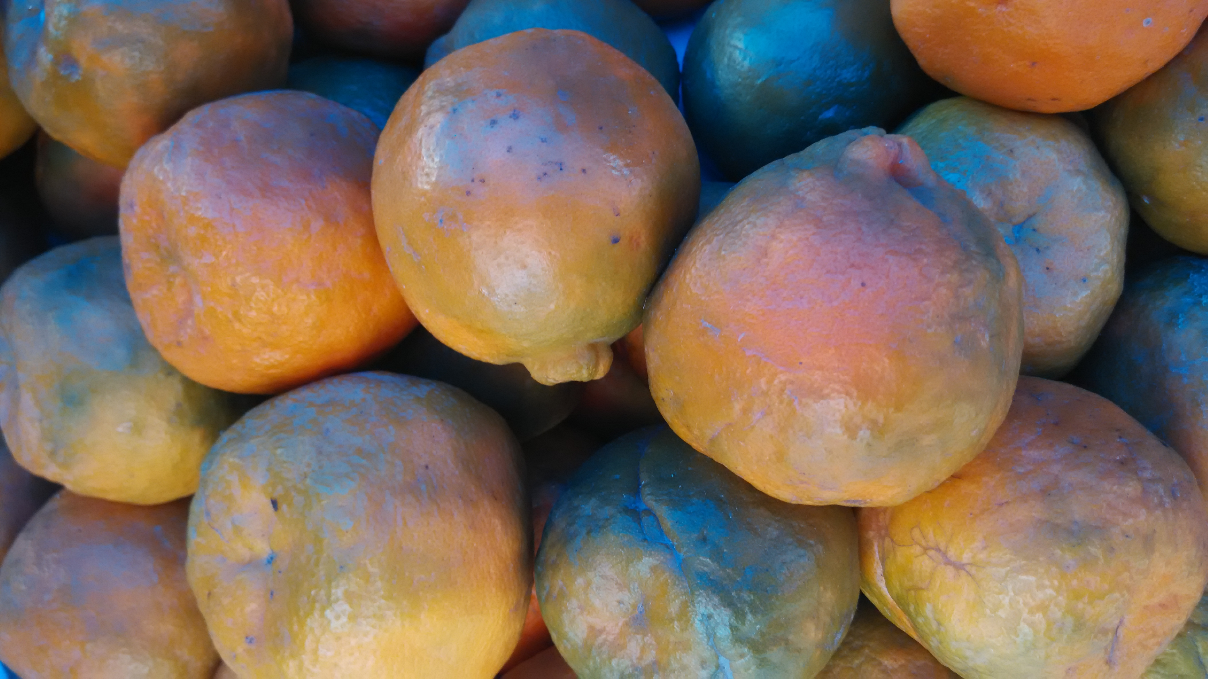 ஆரஞ்சுப் பழங்கள்.